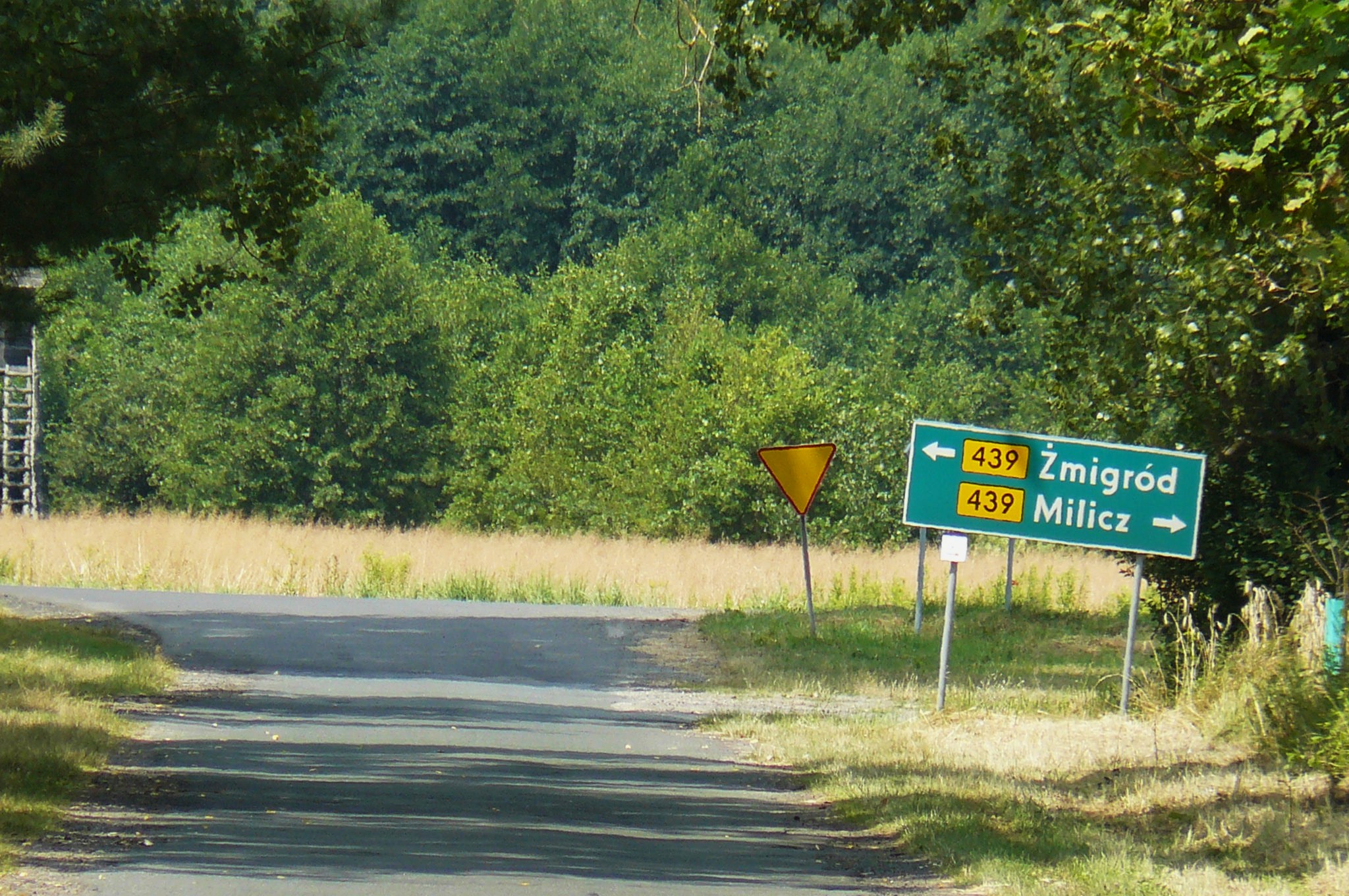 Droga Radziądz - Ruda Żmigrodzka.